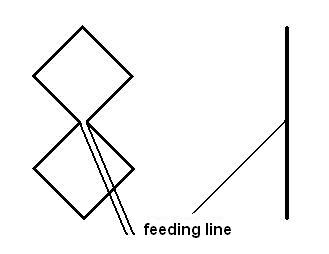 quad antenna, horizontal polarization